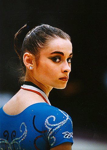 La gimnasta rusa Yulia Barsukova en 1999 el podio del Europeo de Budapest.